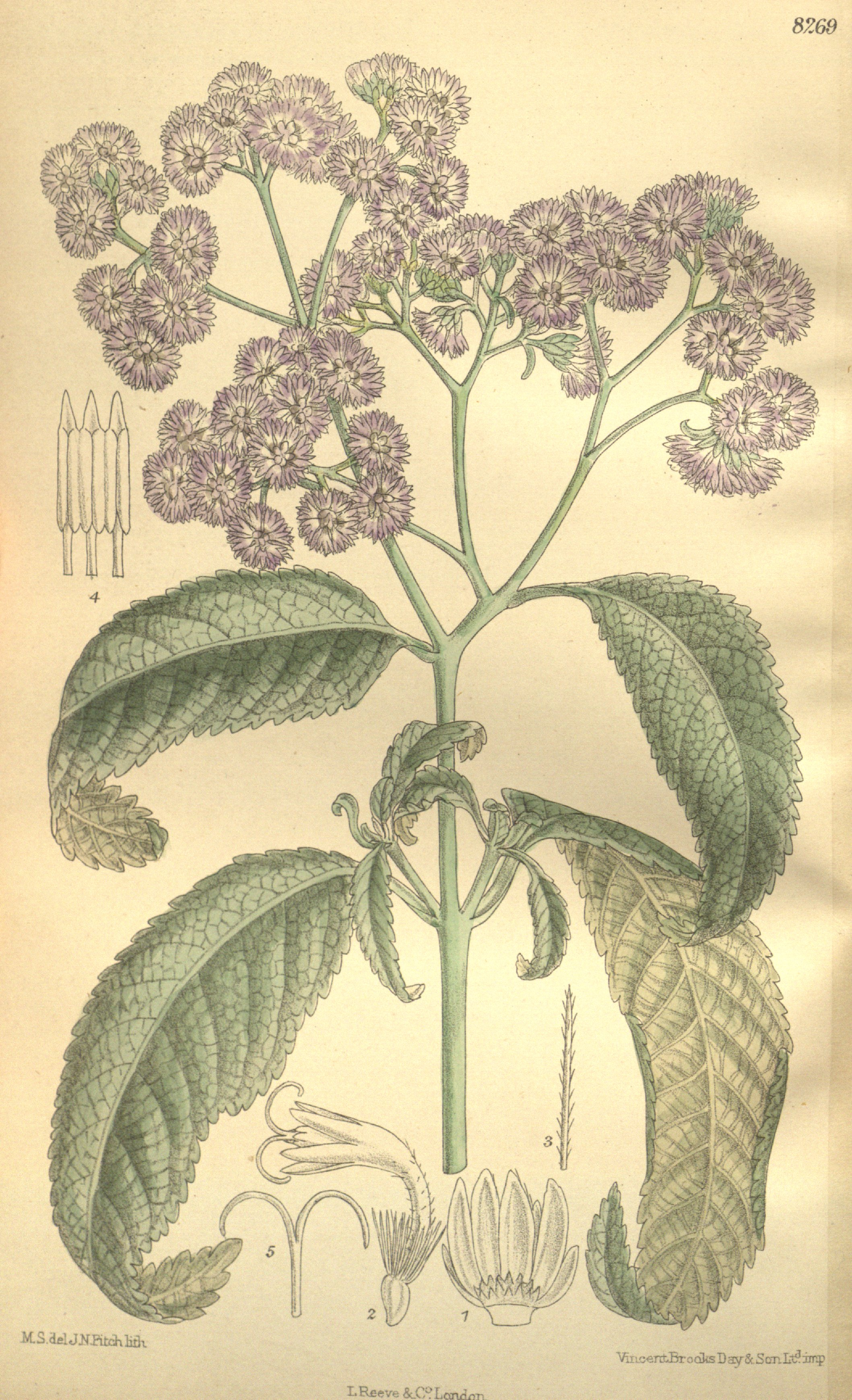 Erlangea tomentosa, Asteraceae